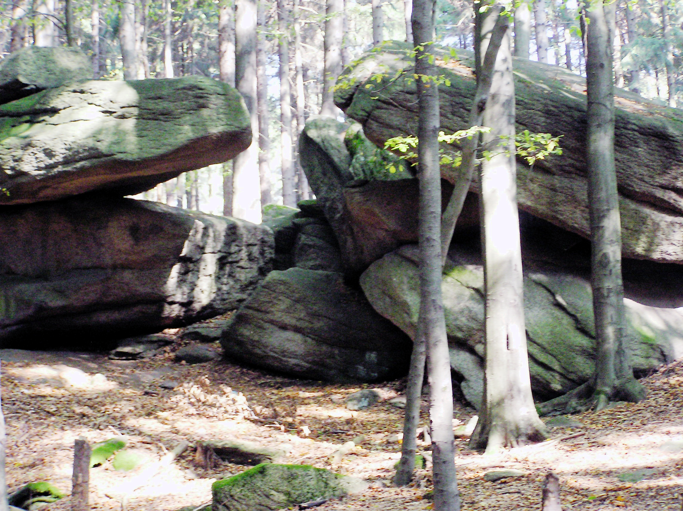 Zigeunersteine am Großen Kornberg